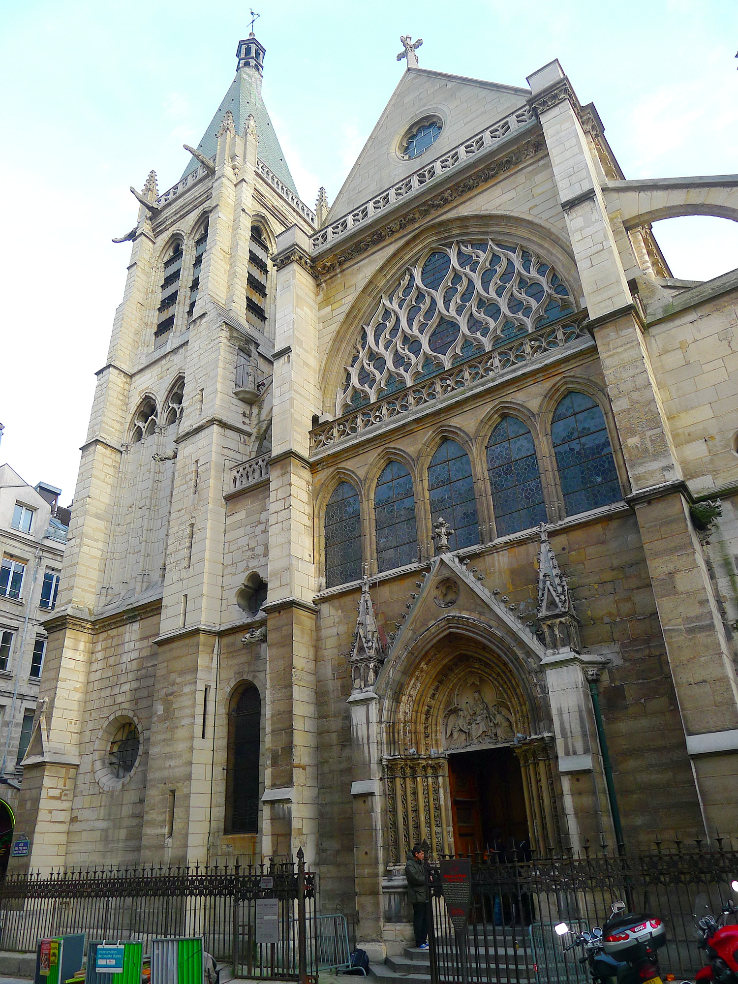 Église Saint-Séverin (façade ouest) - Paris V .